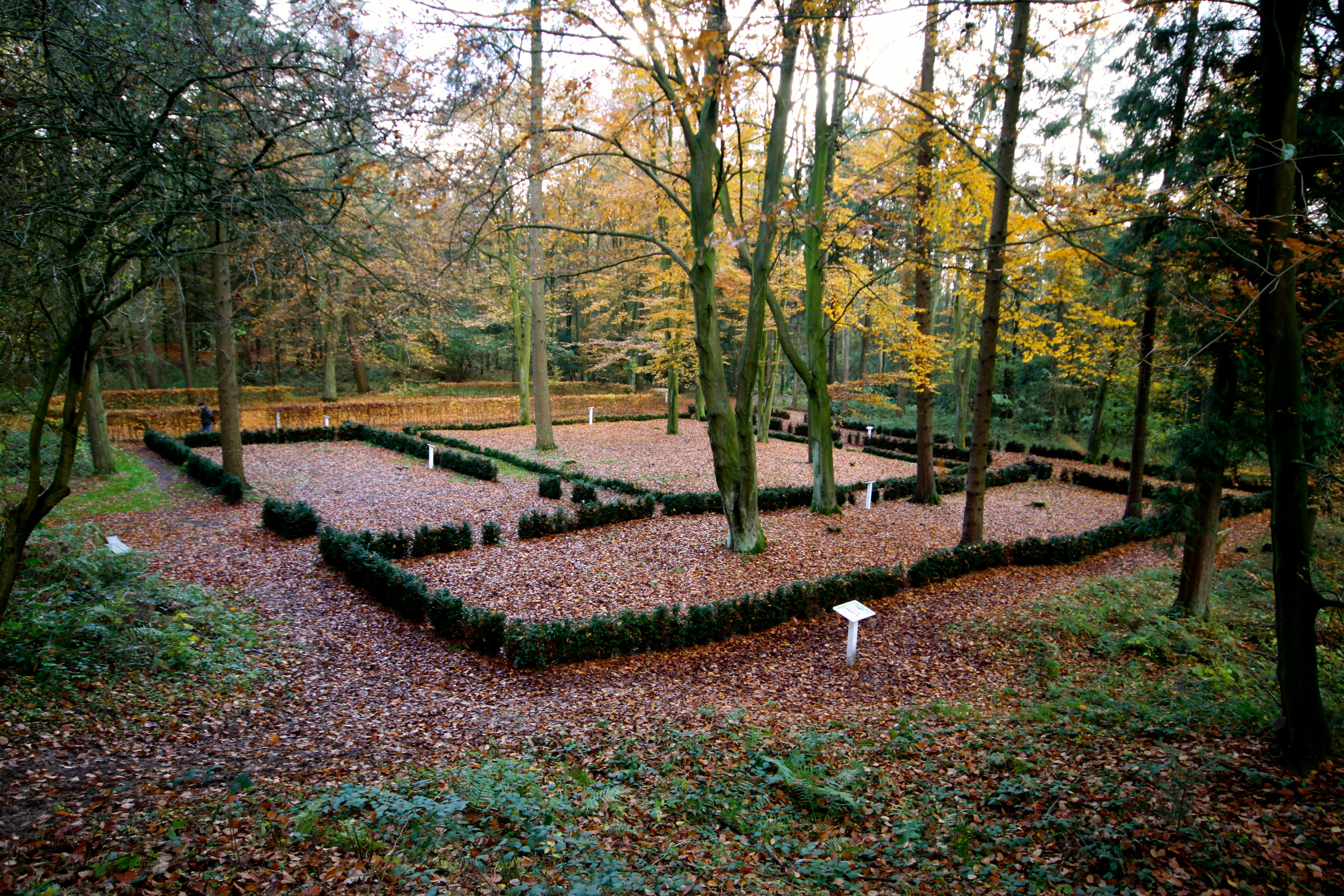 Kloster Barthe- durch Heckenpflanzungen sichtbar gemachter Grundriss